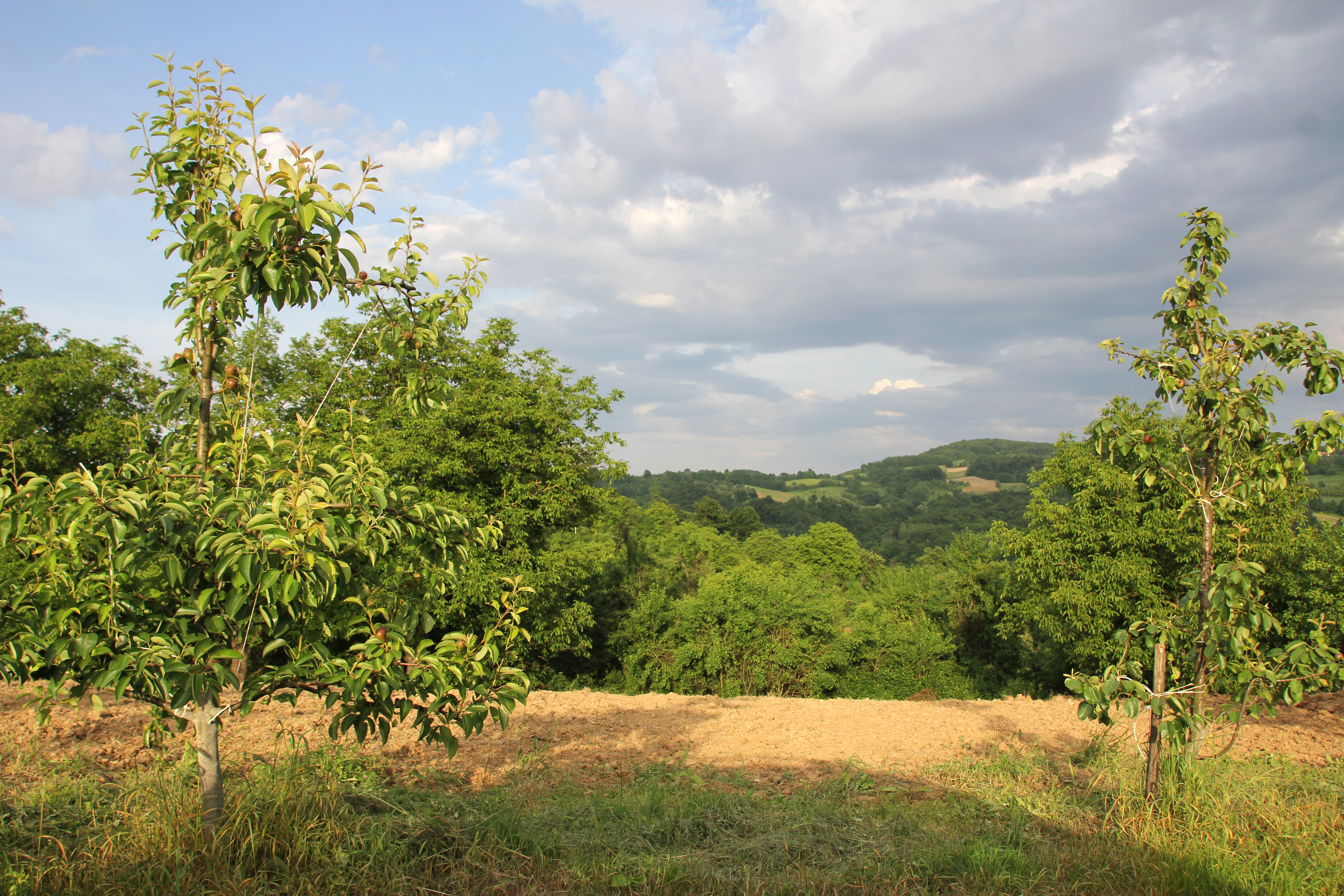 Takovo, zaselak Selište